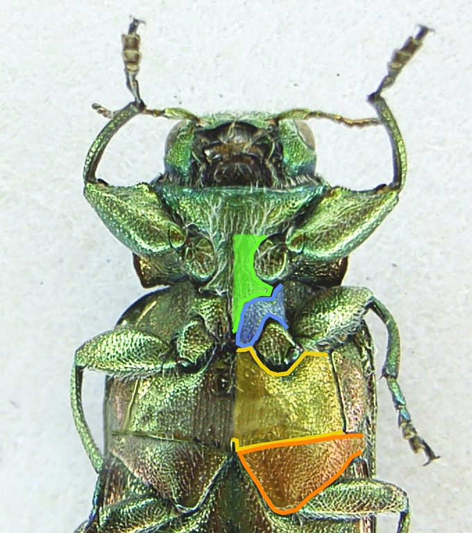 Detail of underside of Chrysobothris affinis grün: Prosternalfortsatz der Vorderbrust blau: Mittelbrust ocker: Hinterbrust orange: Hinterhüfte